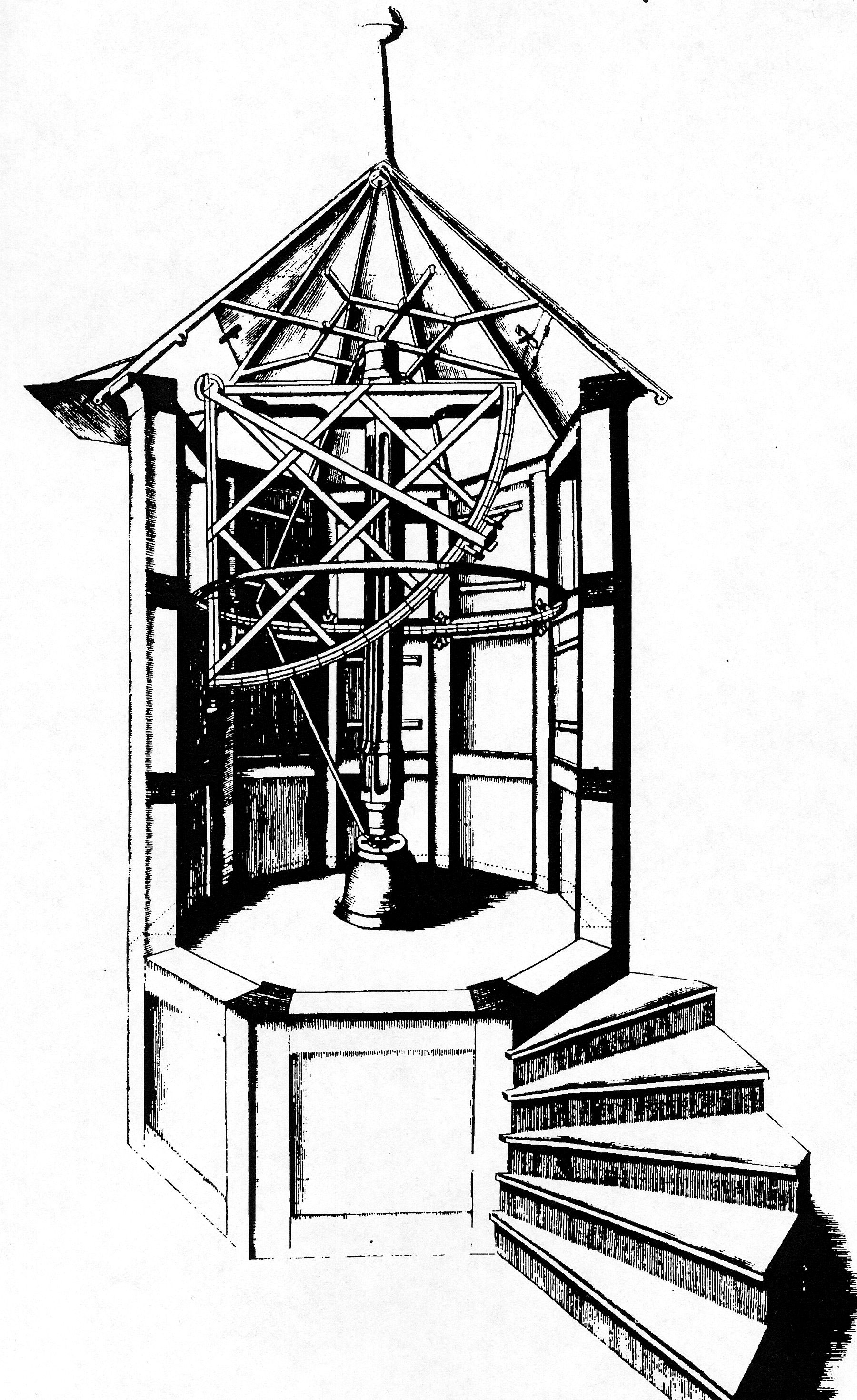 Astronomisches Beobachtungstürmchen im Haus des Johann Philipp von Wurzelbau, Spitzenberg 4 in Nürnberg